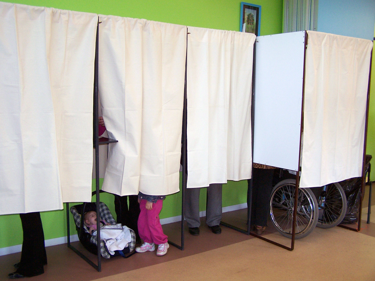 Isoloirs français lors de l'élection présidentielle 2007 2e tour